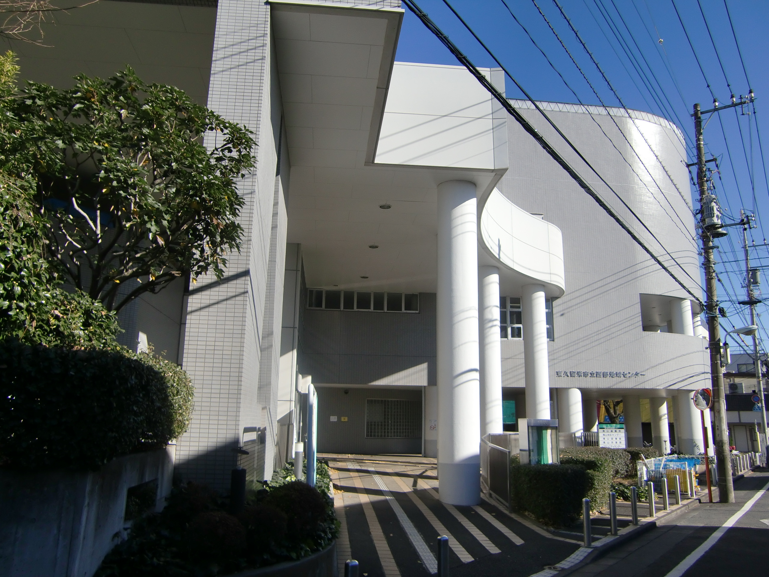 西部地域センター入口（東京都東久留米市）